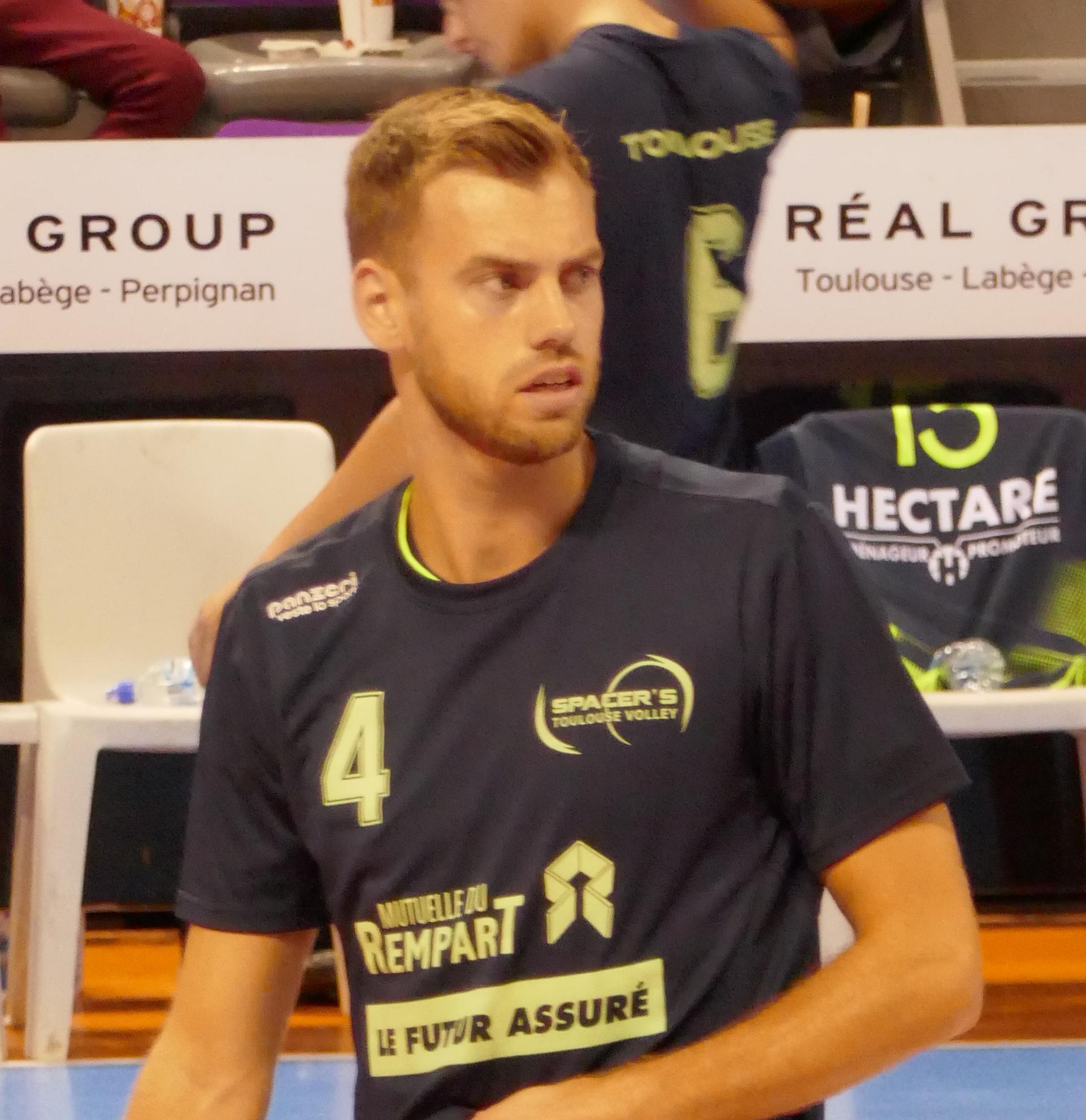 Gijs Jorna le 29 octobre 2019 à l'échauffement avec les Spacer's de Toulouse lors du huitième de finale de Coupe de France : Toulouse - Sète.